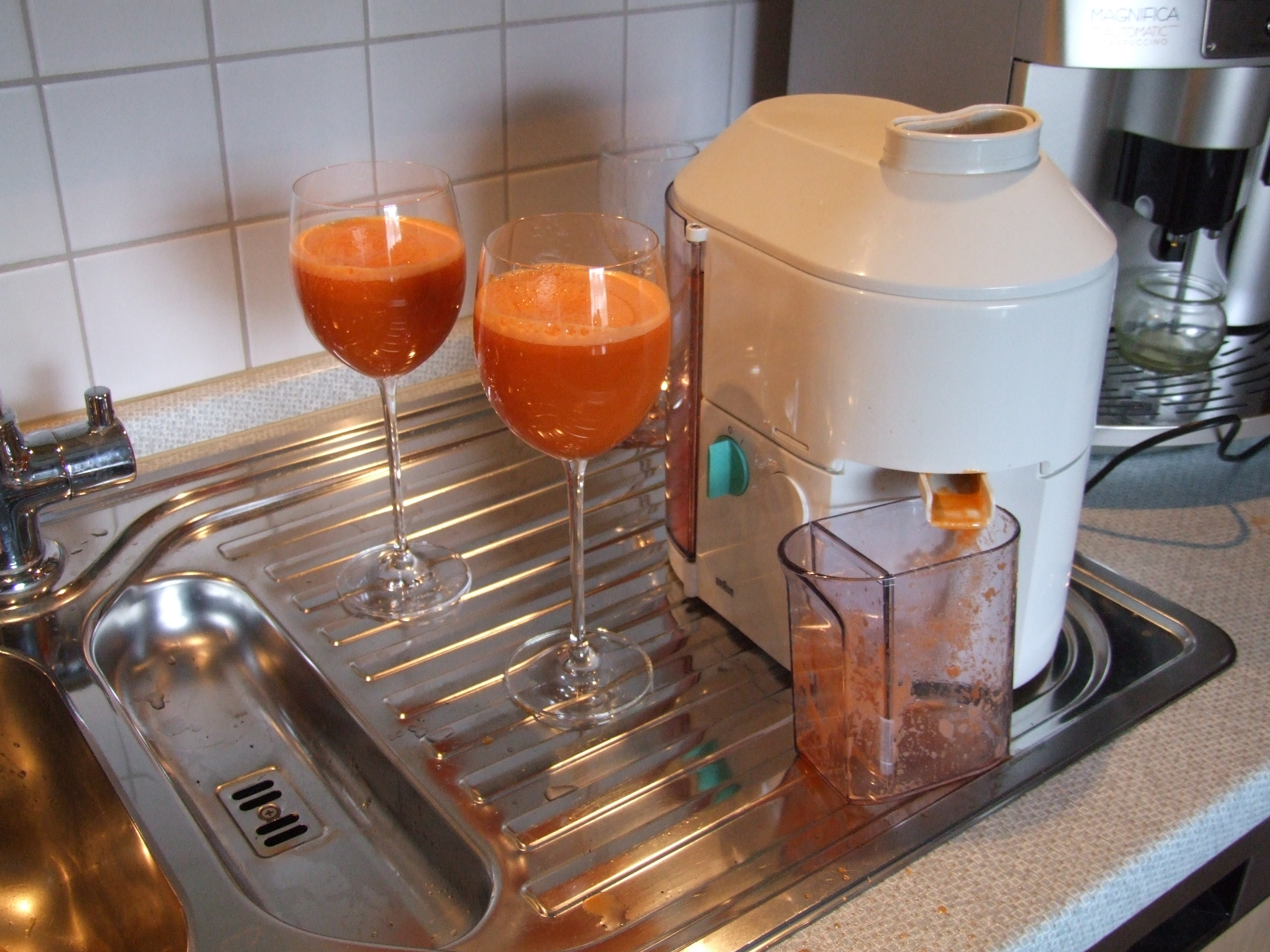 frischgepreßter Karottensaft